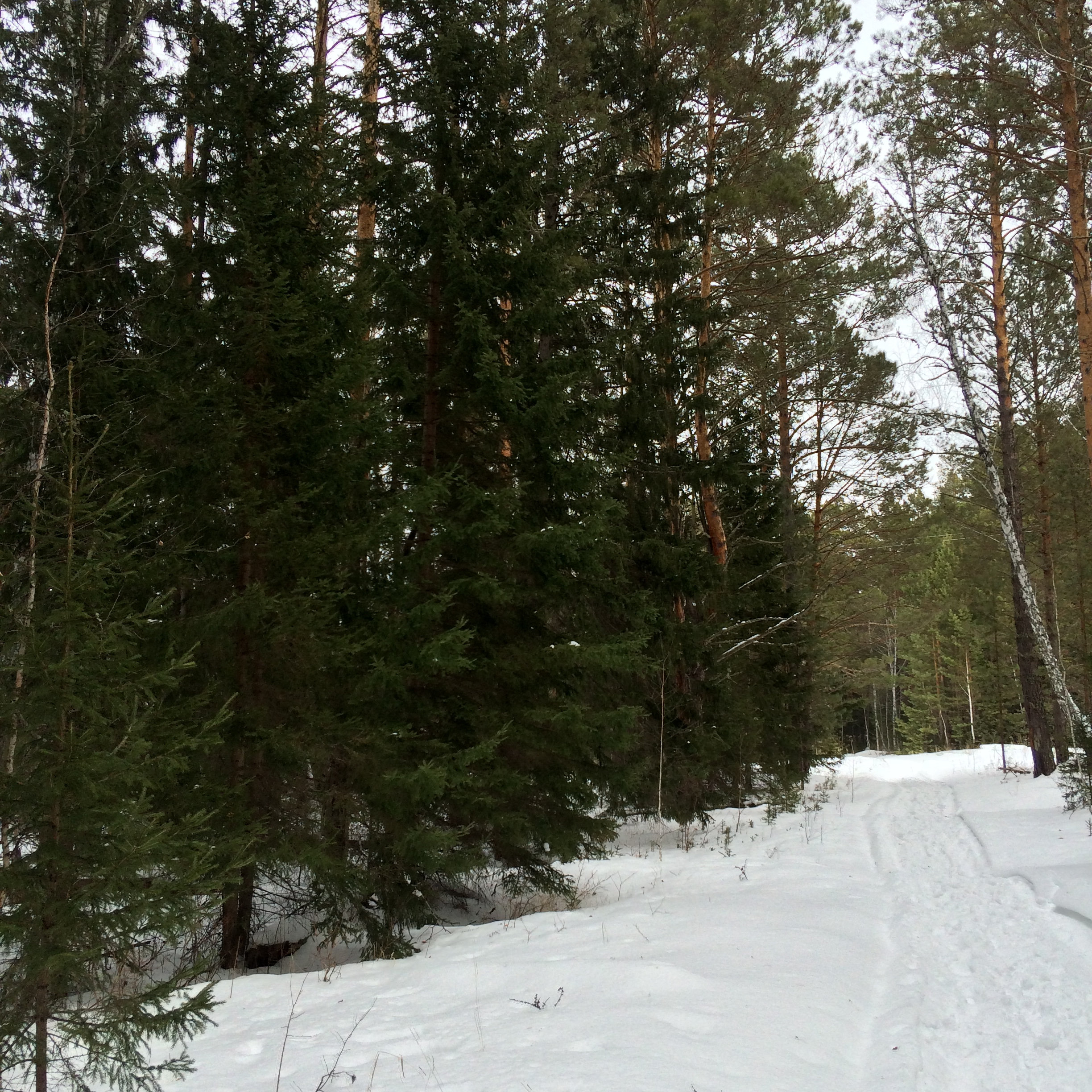 Большая степь: В Канской котловине на левобережье р. Усолки,Дзержинский район, Красноярский край This image is related to the protected area of Russia number 2410048